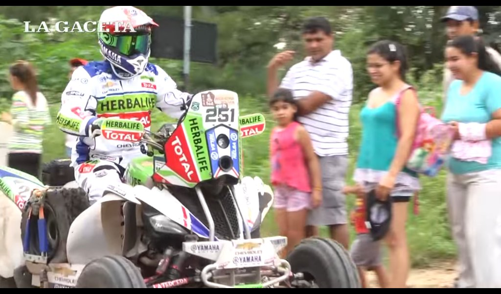 Dakar 2016. Etapa 3. Argentina. Tucumán. Puesto de Espectadores Paraje María Delia. Ignacio Casale